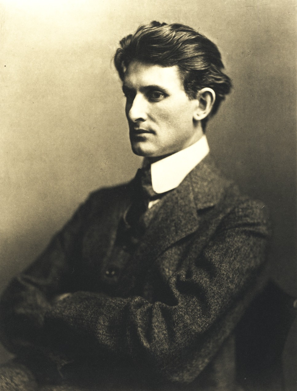 Porträt des Dichters Friedrich Gundolf.